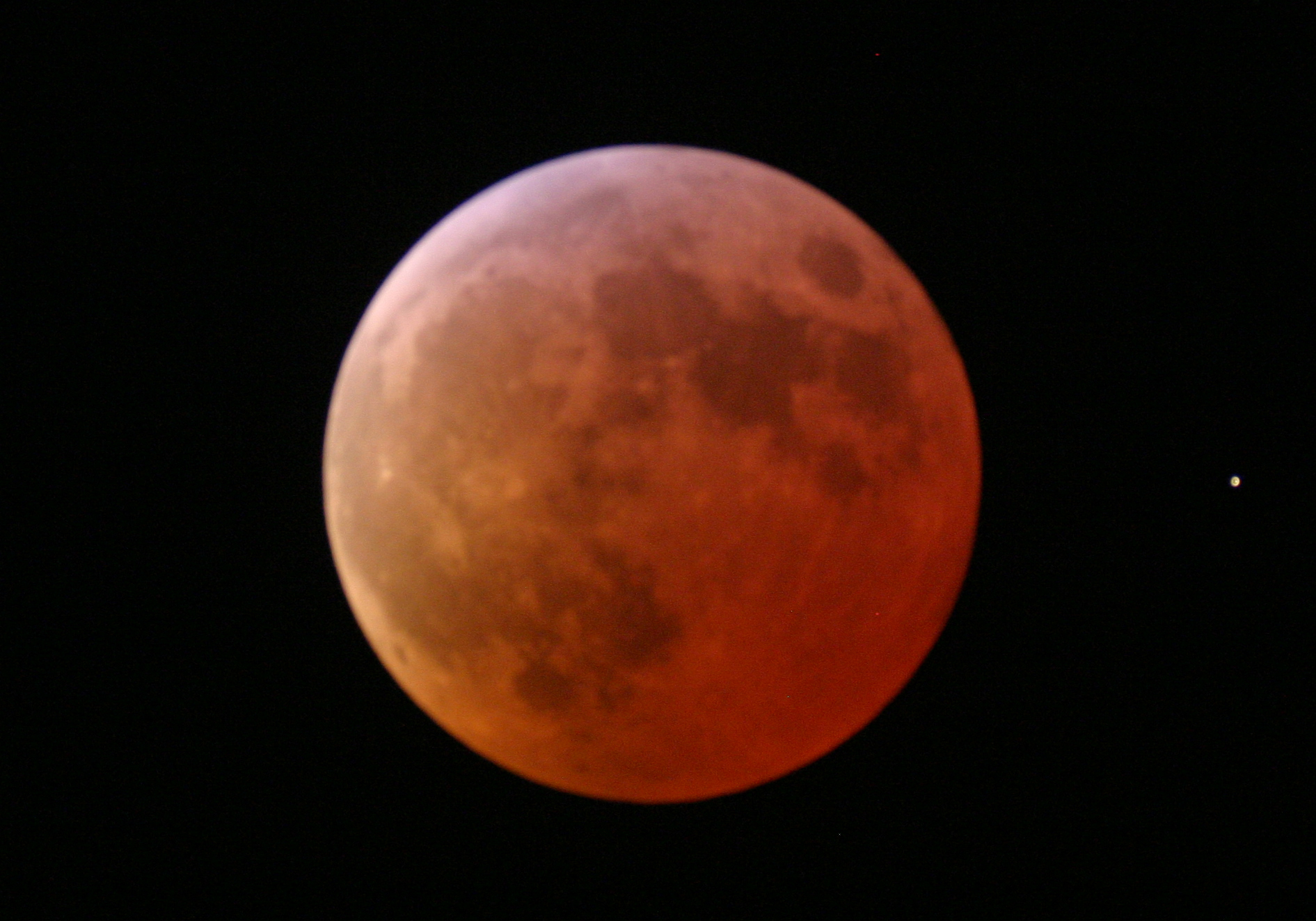 Taken from Astronomy students at AGS (Alssundgymnasiet i Sønderborg) Denmark, the 3.-4- March 2007. Camera : Canon EOS10 with an ASA at 800